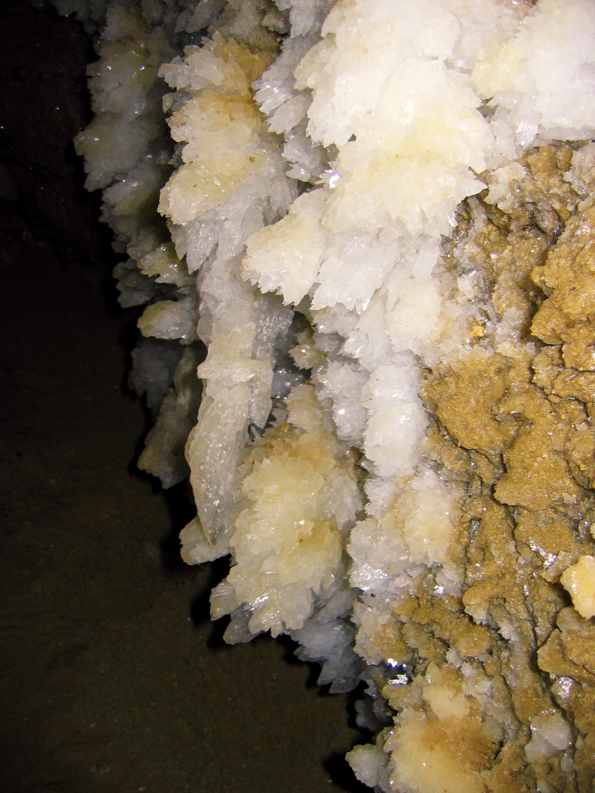 Печера «Оптимістична», :uk:Борщівський район, с. Королівка, Шупарське л-во, кв. 2 в. 7, лісове урочище «Королівка»